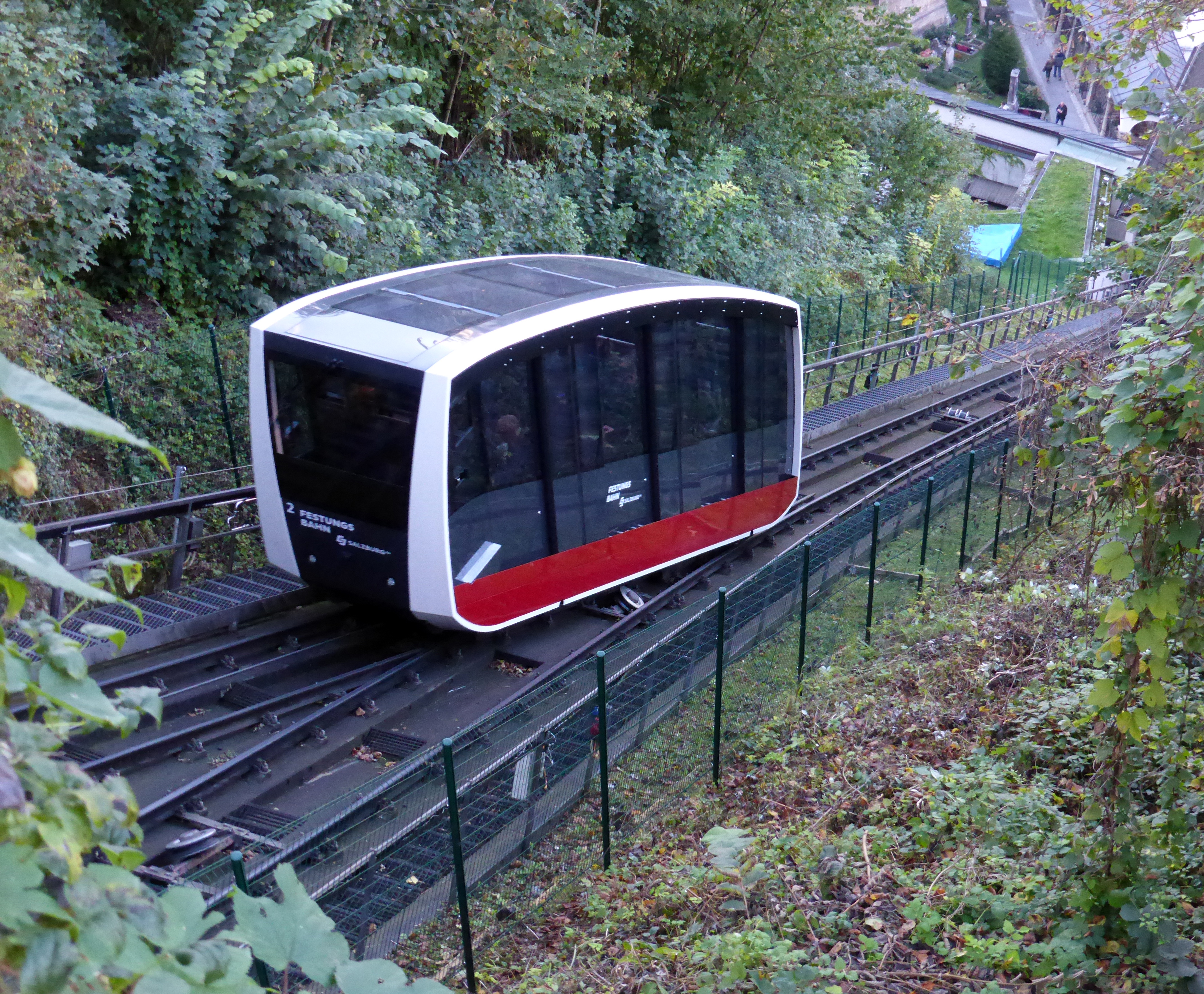 Festungsbahn Salzburg, Wagen 2, am unteren Ende der Ausweiche, Baujahr 2011.